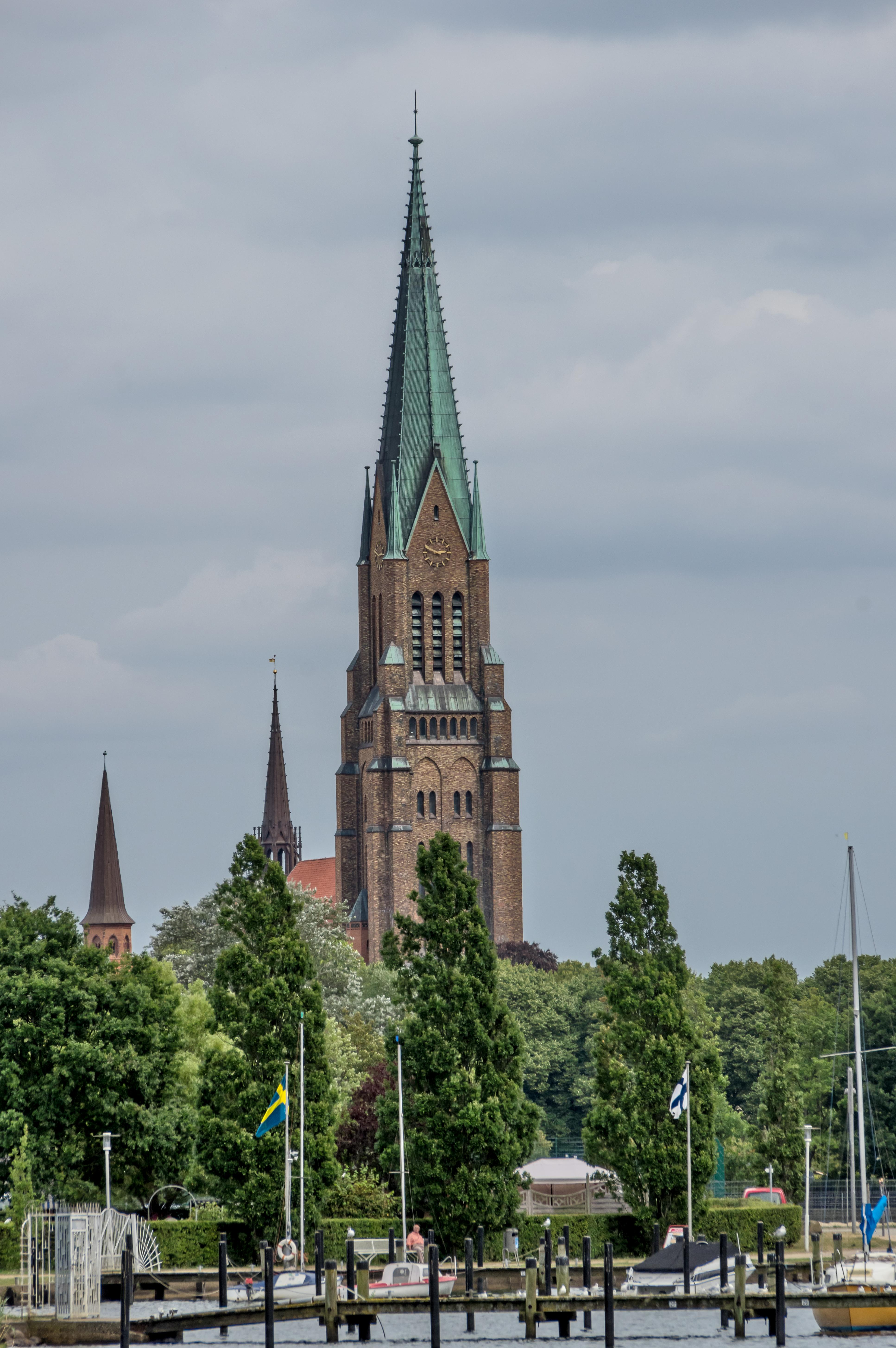 Bilder aus Schleswig Bilder des Doms von außen Bilder vom Dom St. Petri in Schleswig